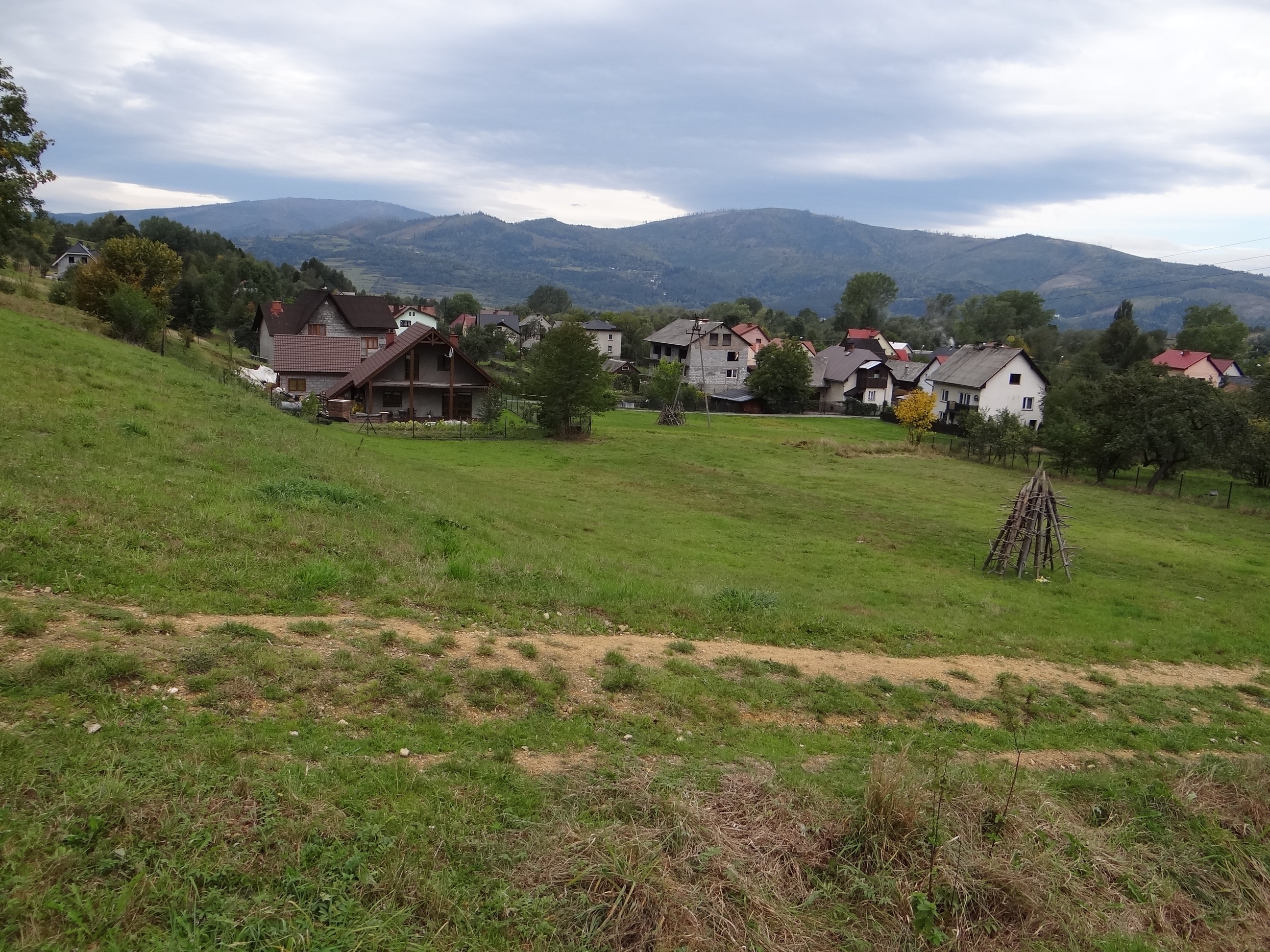 Widok na Żabnicę, Beskid Śląski i dolinę Soły z Boryczy